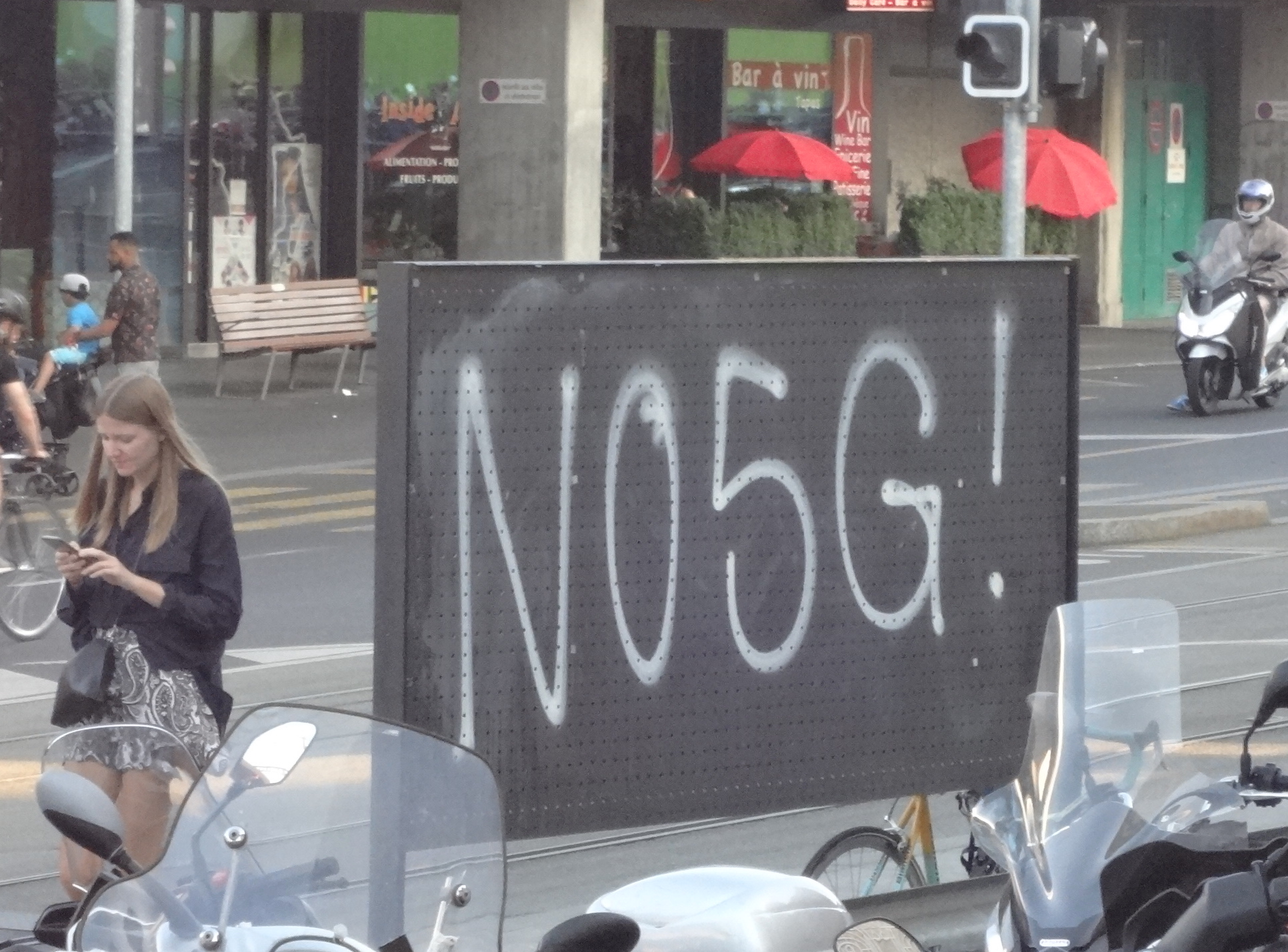 Au dos d'un panneau d'affichage, un graffiti « NO5G! » s'oppose au standard 5G de téléphonie mobile, place de Montbrillant, derrière la gare à Genève.